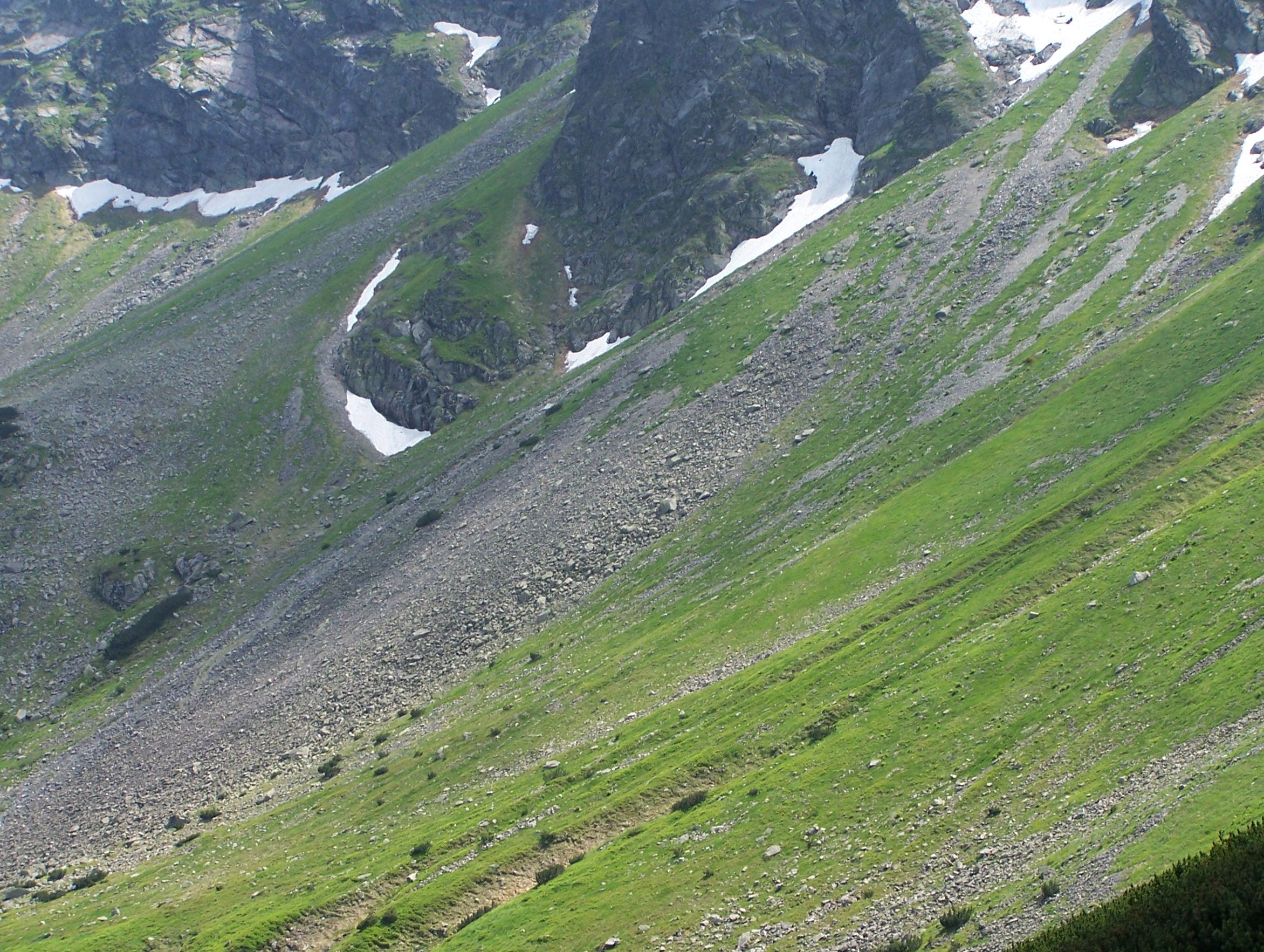 Dolina Gąsienicowa (Tatra Mountains)